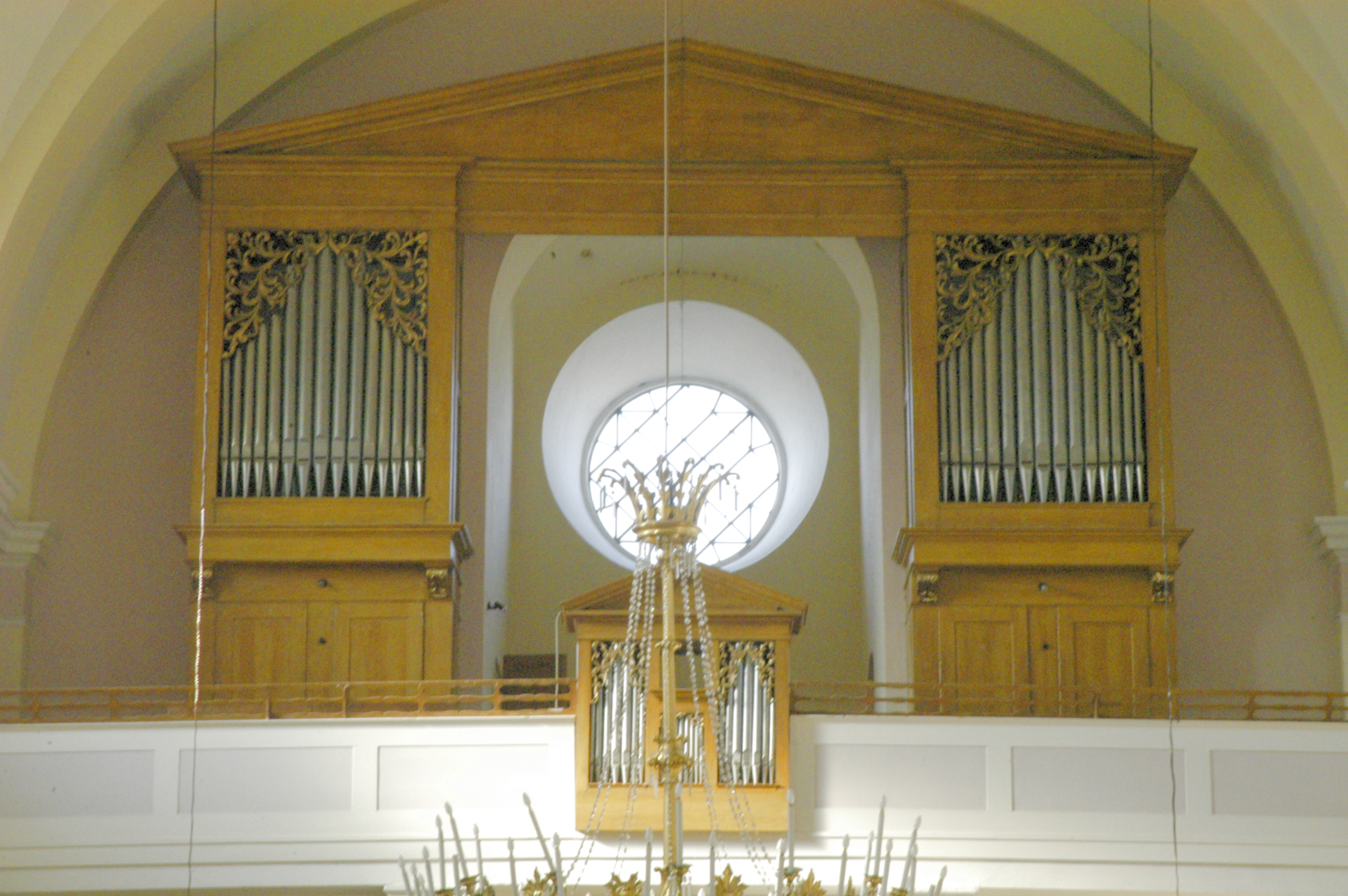 katholische Pfarrkirche heiliger Ulrich / Orgel